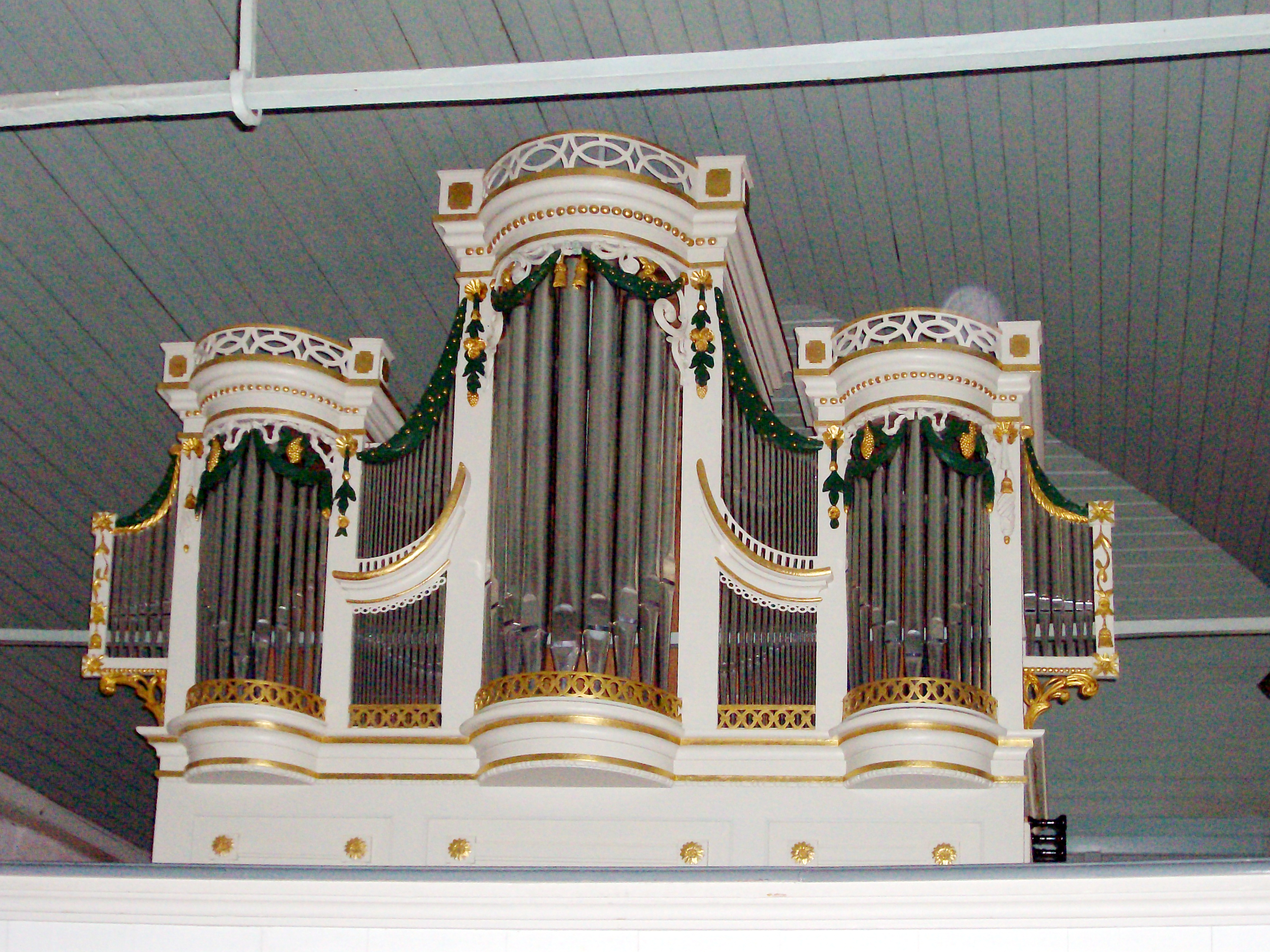 Orgel Landschaftspolder